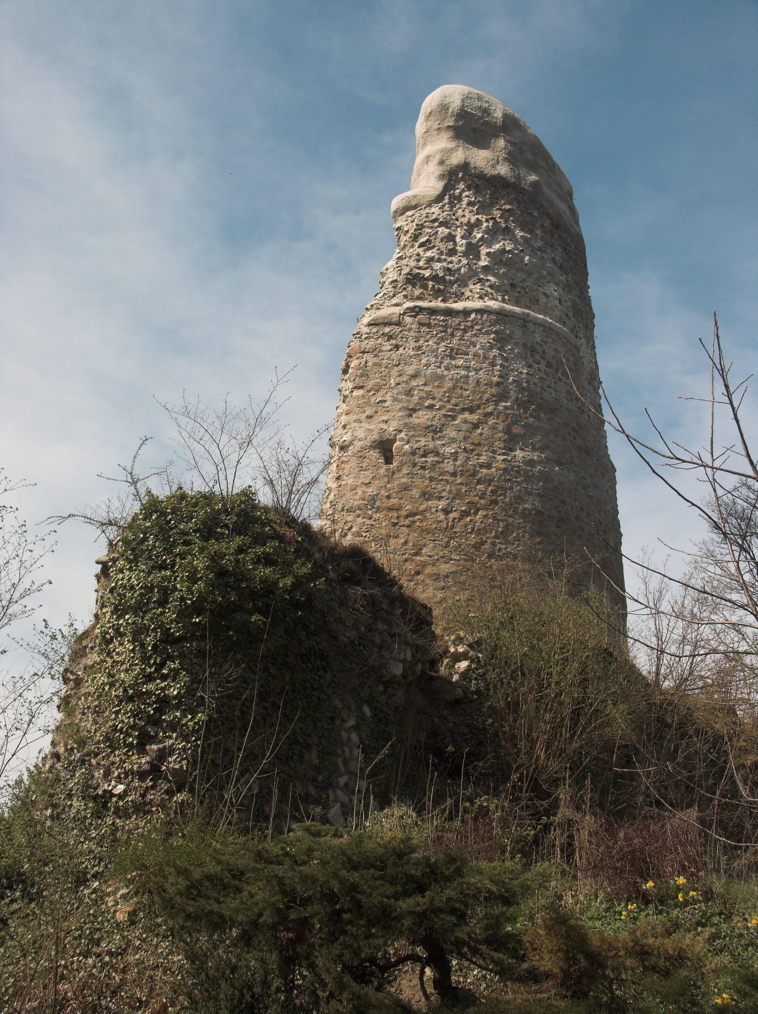 Burgruine in Osterode am Harz